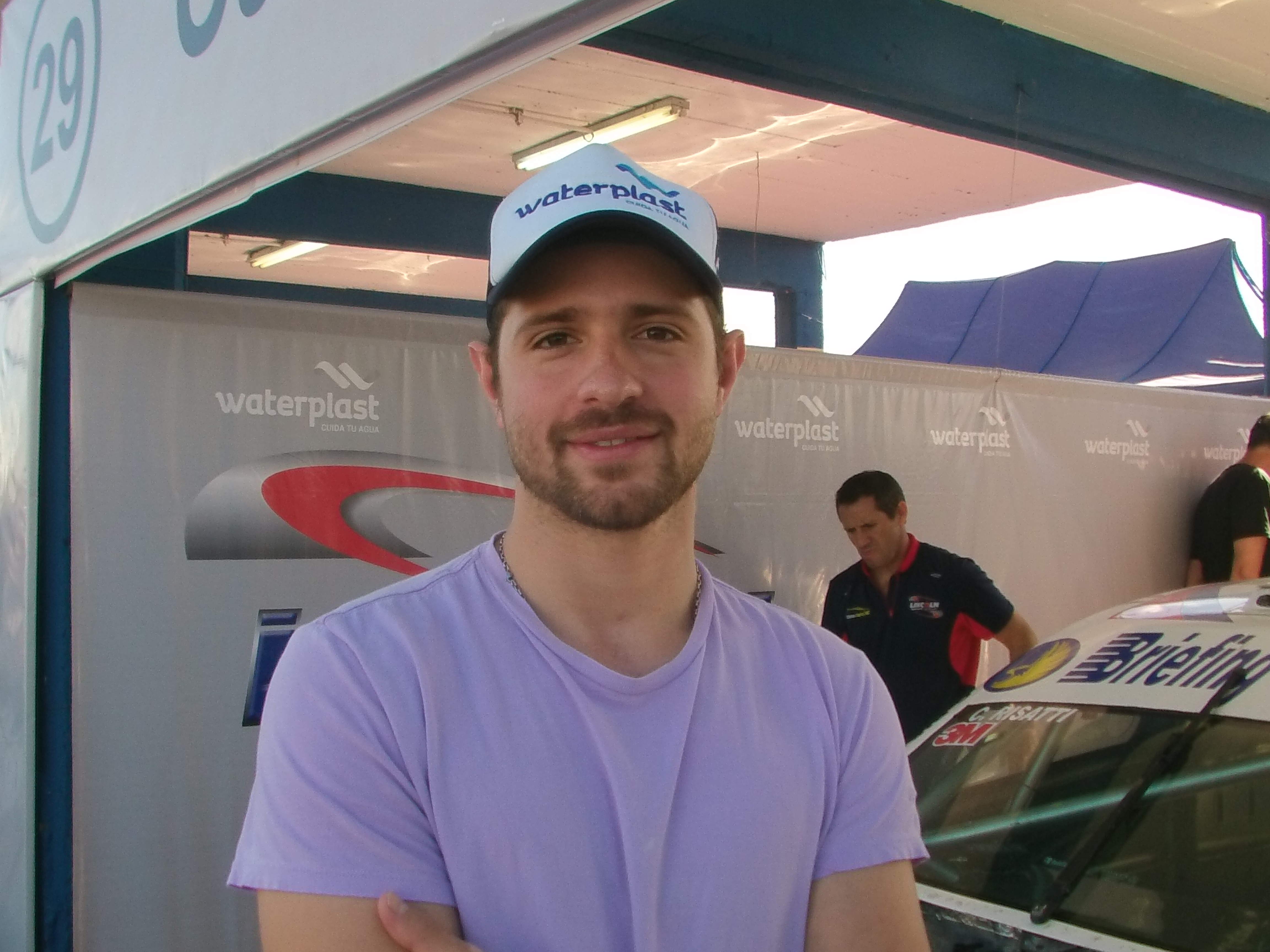 Mauro Giallombardo, piloto argentino de automovilismo de velocidad. Campeón 2008 de TC Mouras. Campeón 2010 de TC Pista. Campeón 2012 de Turismo Carretera.